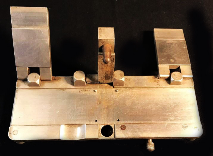 Presse à souder les films 35 mm (dite improprement presse à coller). Compagnie des Travaux Mécaniques (C.T.M.). Environ 1930.